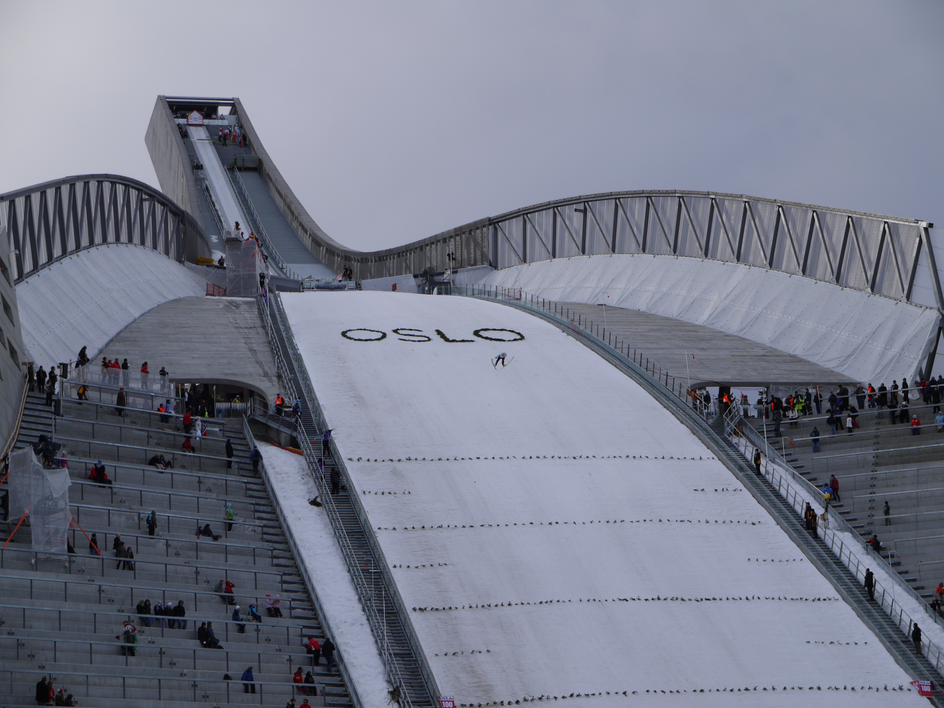 Holmenkollen Ski Jumping Hill (Holmenkollbakken) in Oslo, Norway. From the 2010 World Cup event in Holmenkollen.